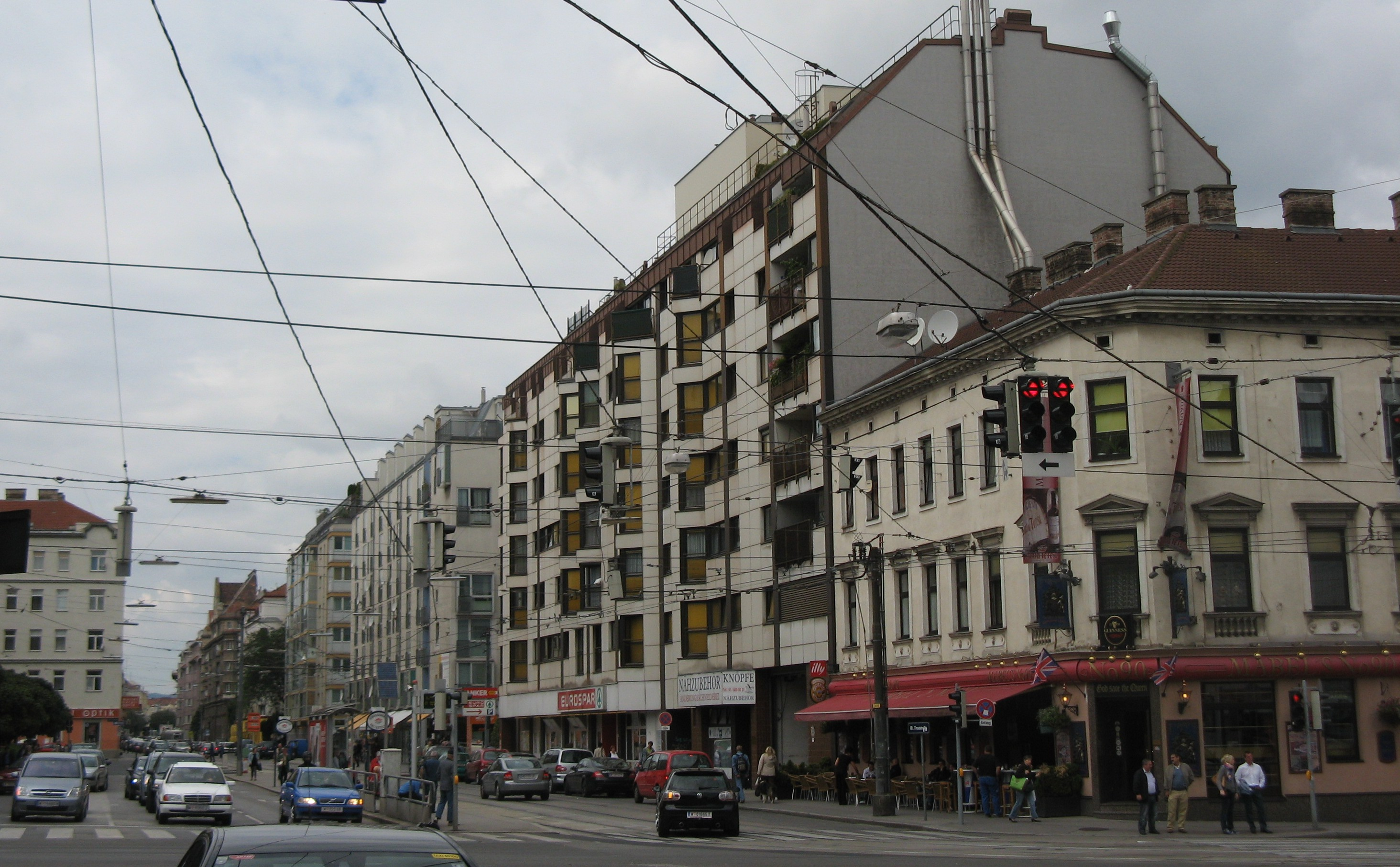 Troststraße, Wien-Favoriten